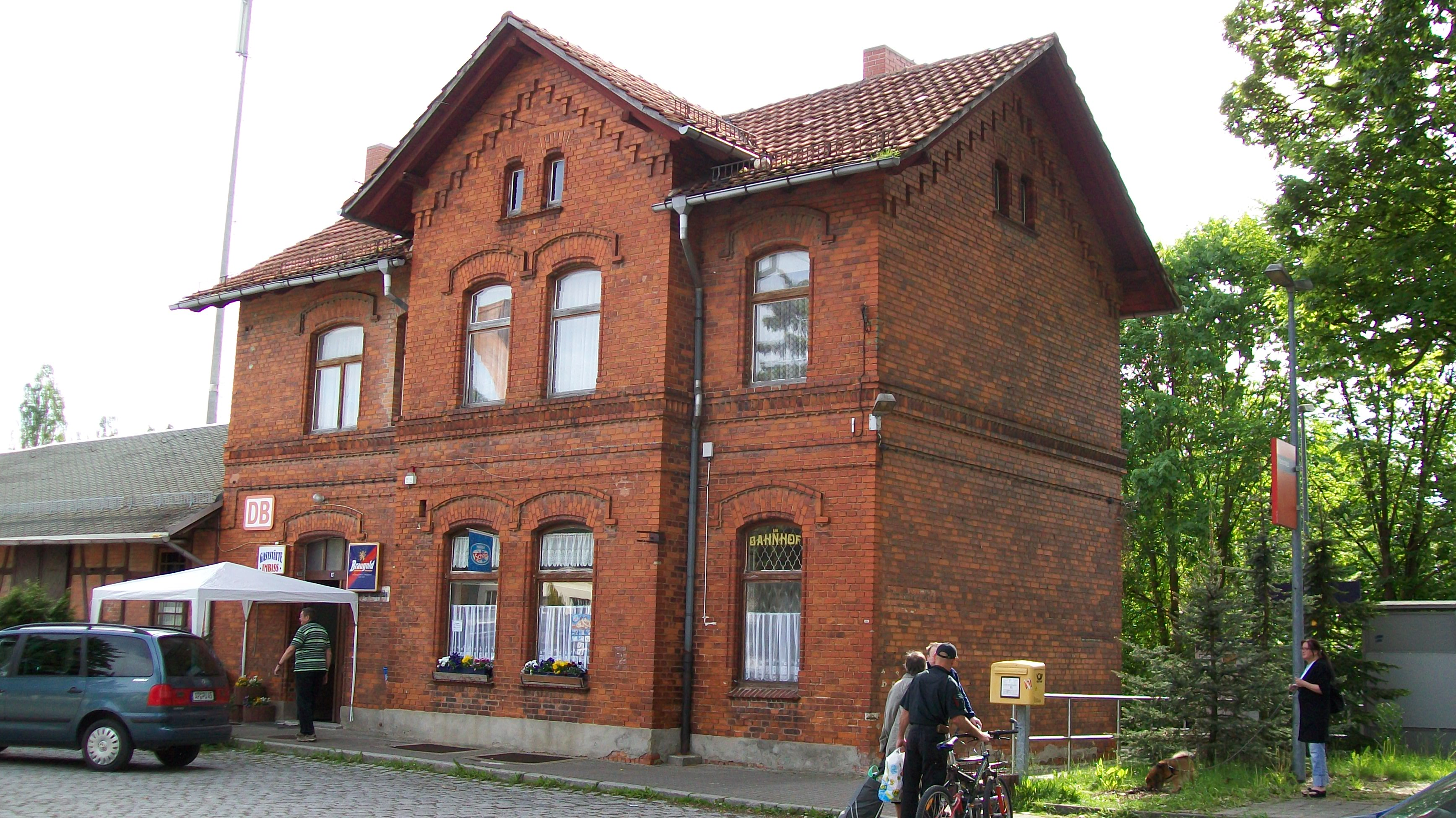 Stacidomo en Kranichfeld (Turingio, Germanio)